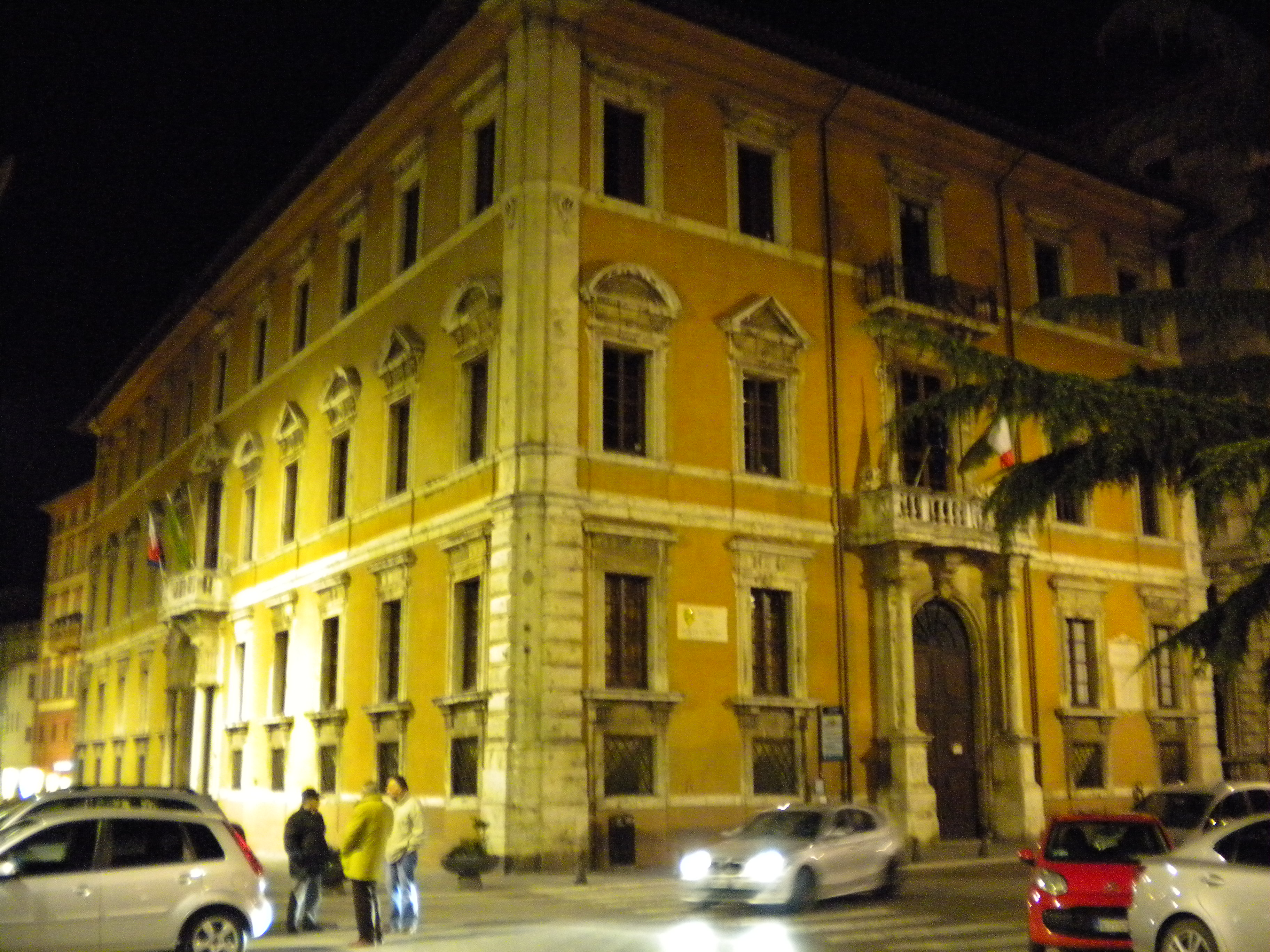 Palazzo Donini, splendido palazzo settecentesco, può definirsi il primo "condominio" borghese di Perugia. Infatti mai prima di allora (1716) era stato realizzato un palazzo con l'intenzione di farvi condividere l'abitazione di più famiglie. Oggi è sede della Giunta Regionale dell'Umbria e conserva il ciclo pittorico "Avventure, sventure e glorie dell'antica Perugia" di Salvatore Fiume.